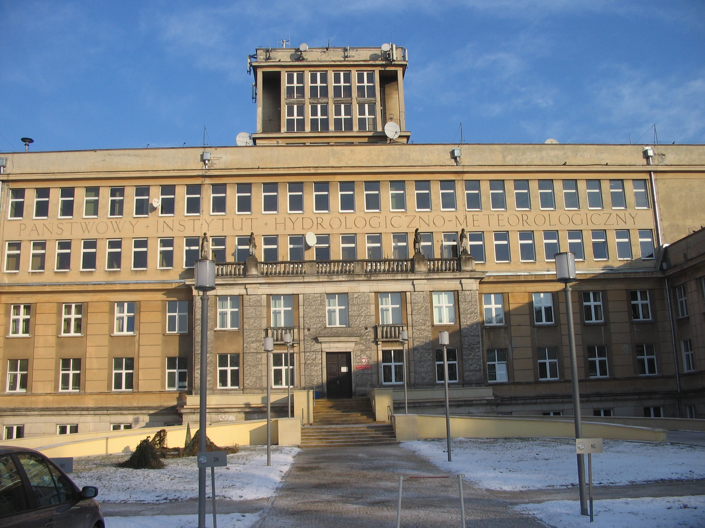 siedziba Instytutu Meteorologii i Gospodarki Wodnej w Warszawie